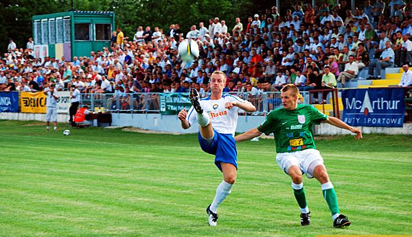 Podlasie Biała Podlaska-Stal Mielec 2009r. widzów 3000